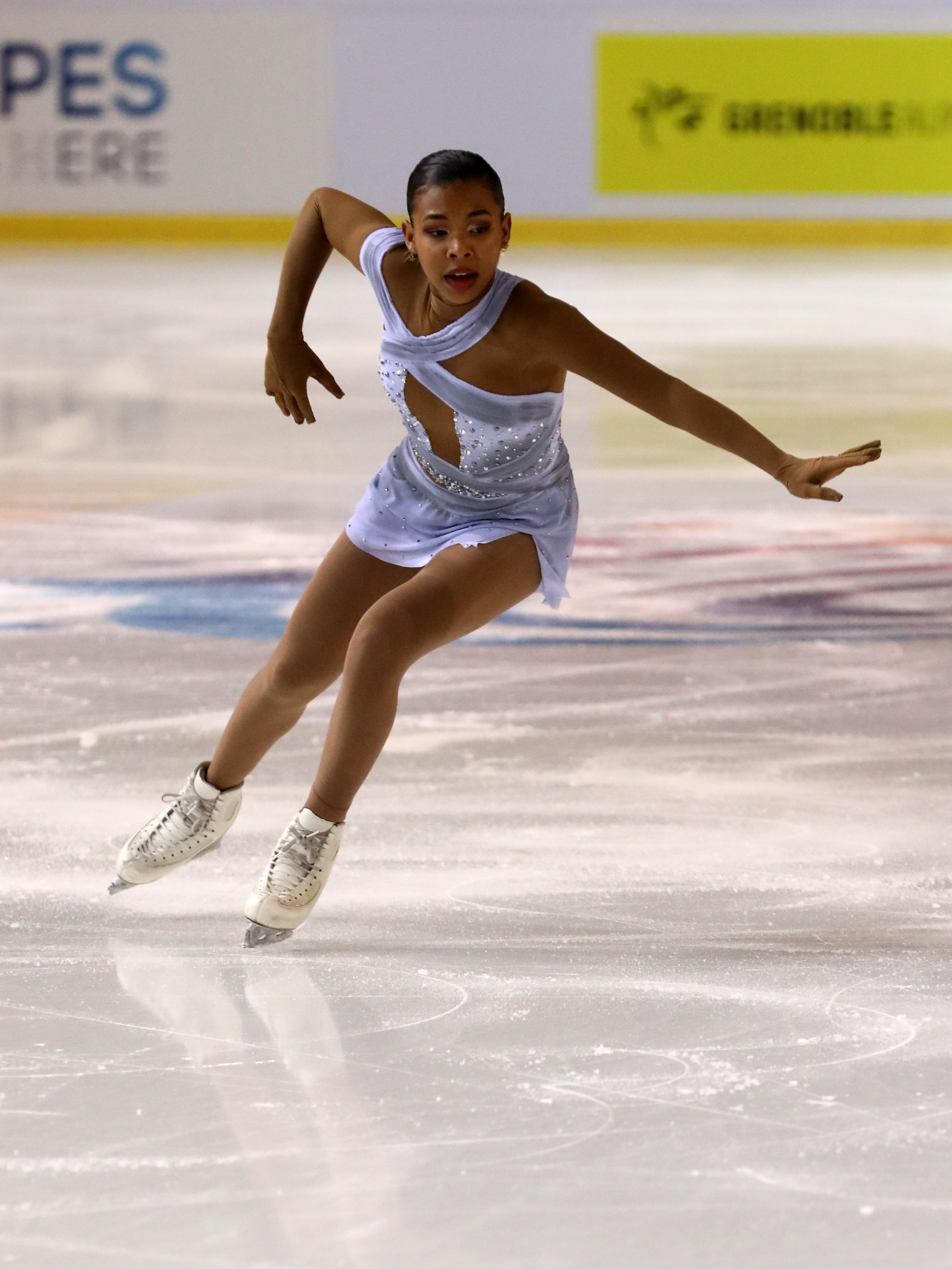 Starr Andrews, programme court aux Internationaux de France 2019, Grenoble.